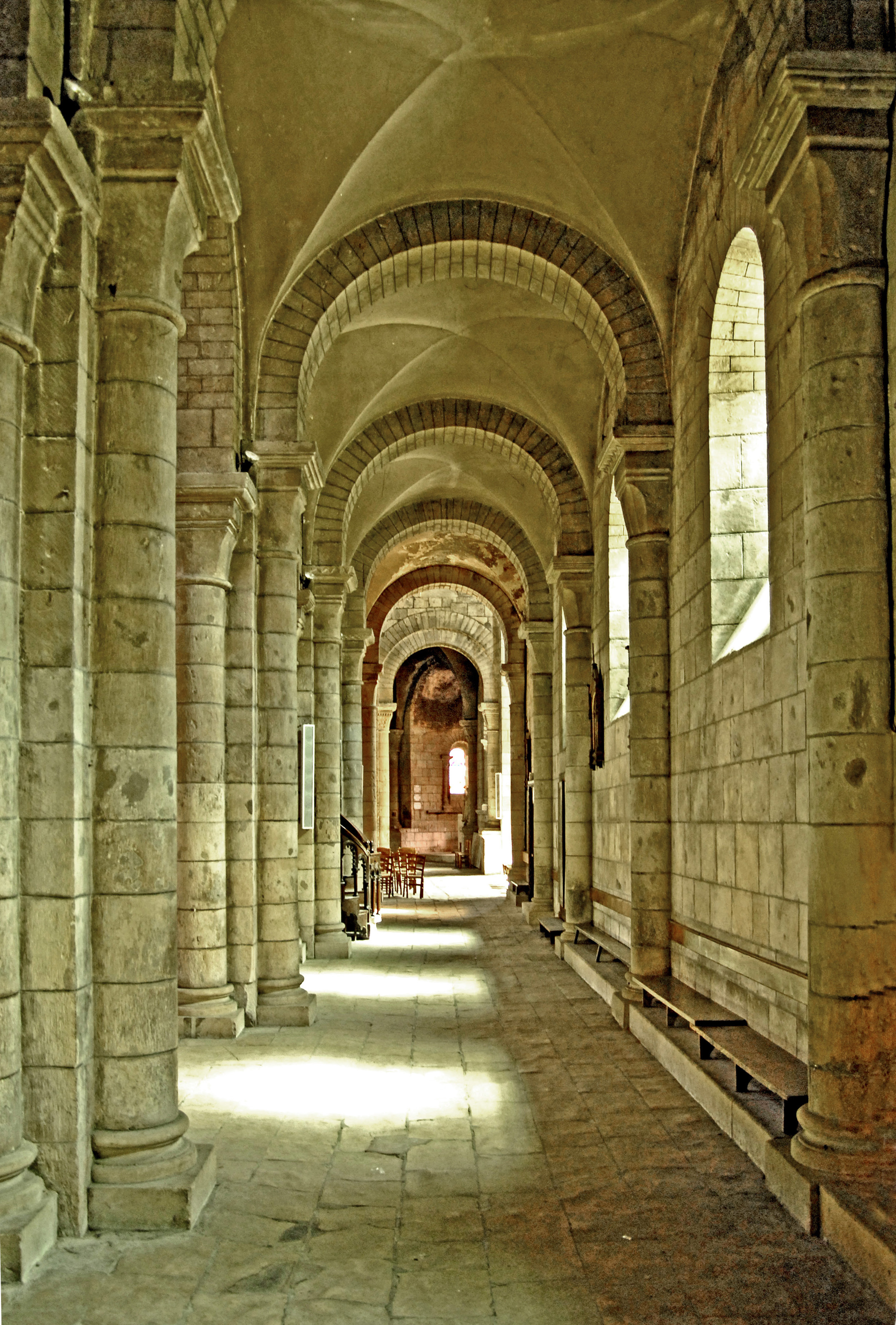 St.-Etienne Nevers, südl. Seitenschiff